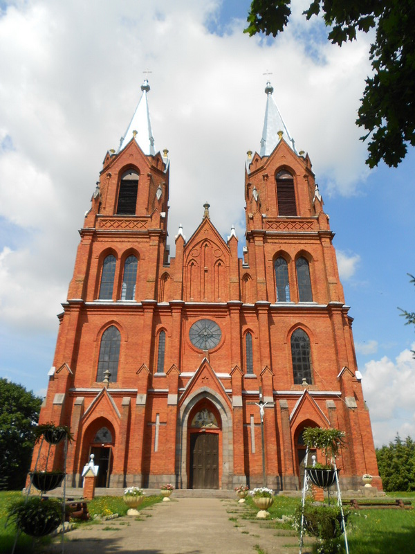 Старыя Васілішкі. Касцёл Святых Пятра і Паўла